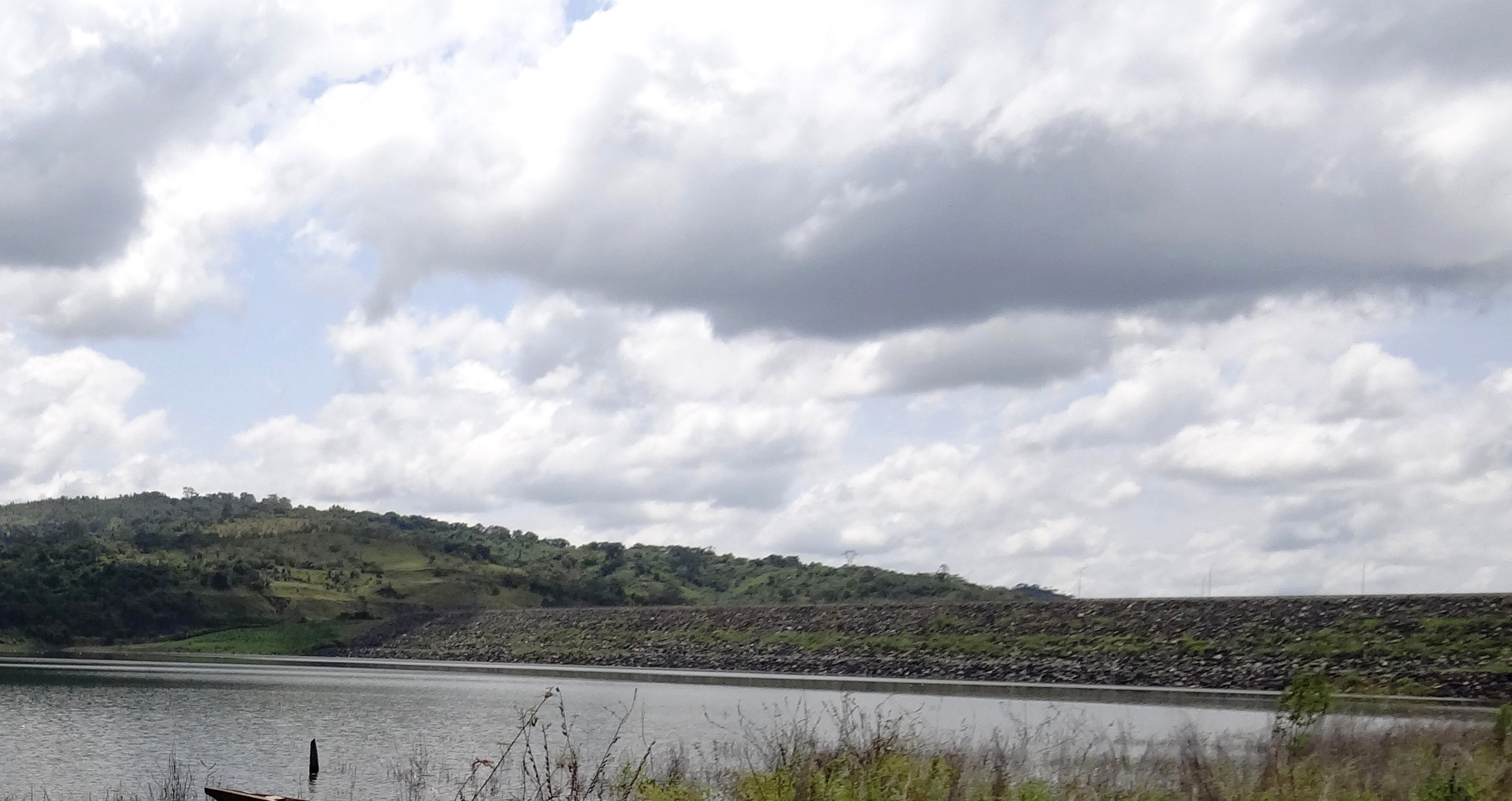 סכר קוסו הסוכר את נהר בנדמה ויוצר את אגם קוסו בחוף השנהב מבט מכוון האגם